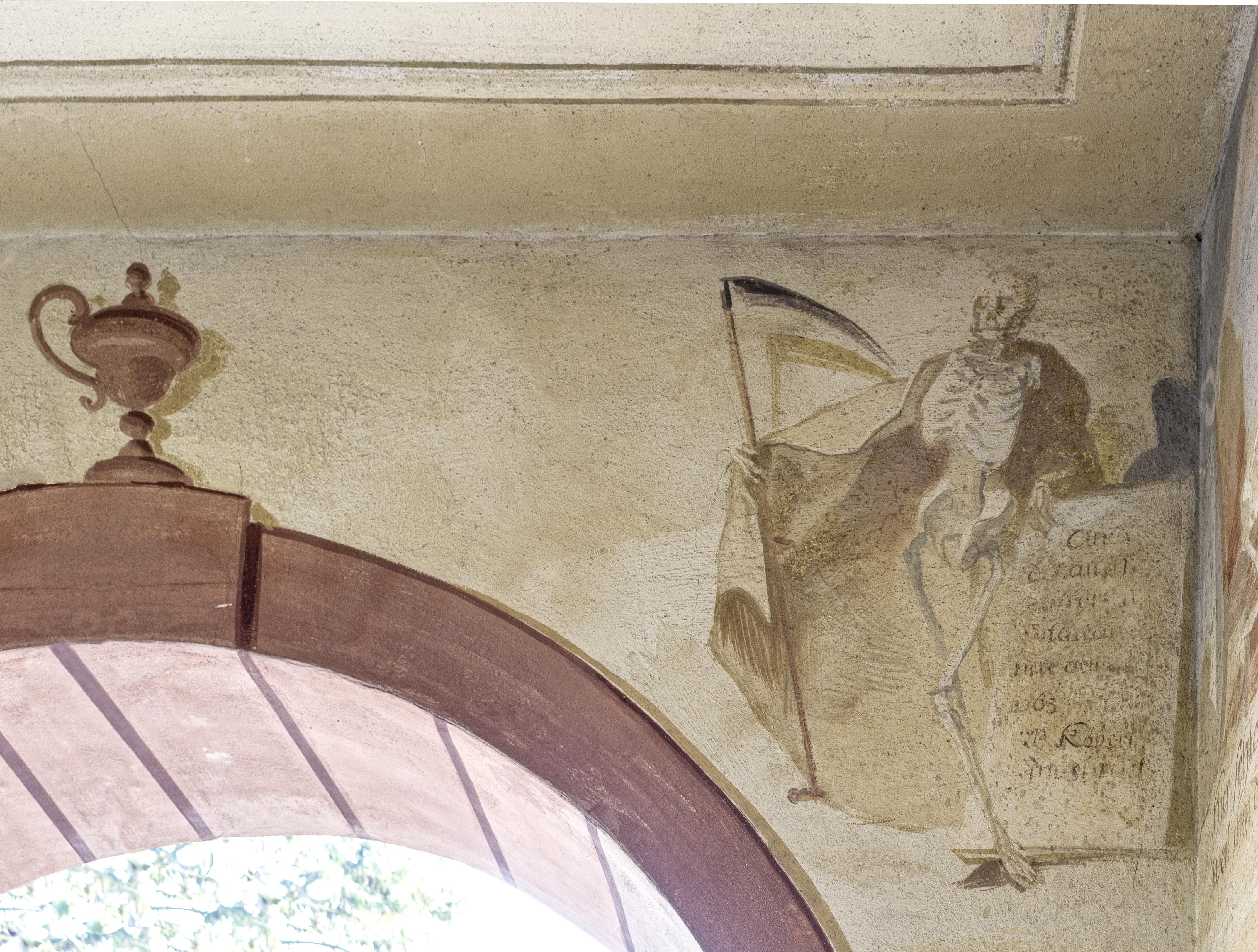 Der Totentanz in der Michaelskapelle auf dem Alten Friedhof in Freiburg im Breisgau nach der Restaurierung 2012 Die linke Abschlußfigur